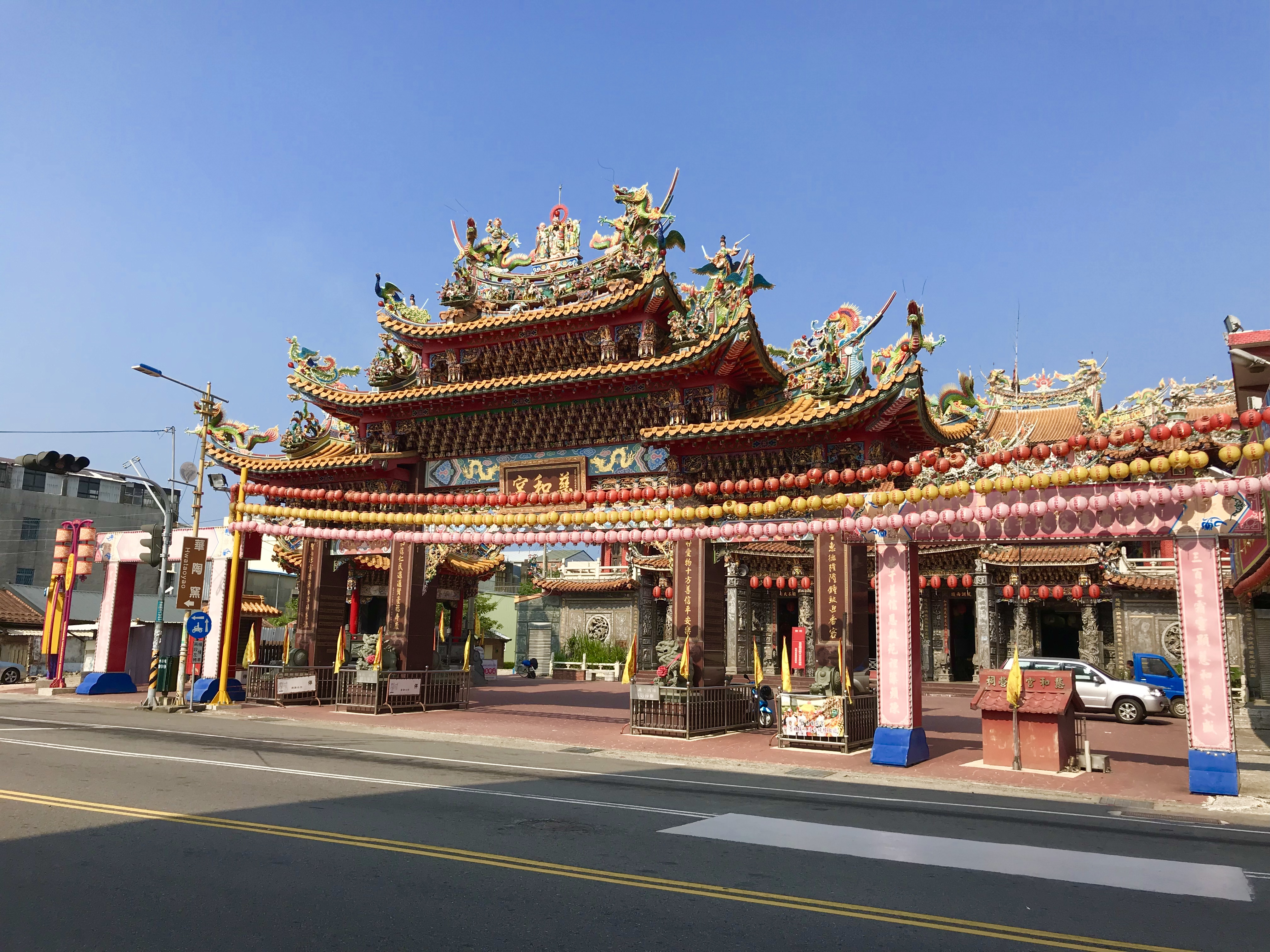 苑裡慈和宮牌樓